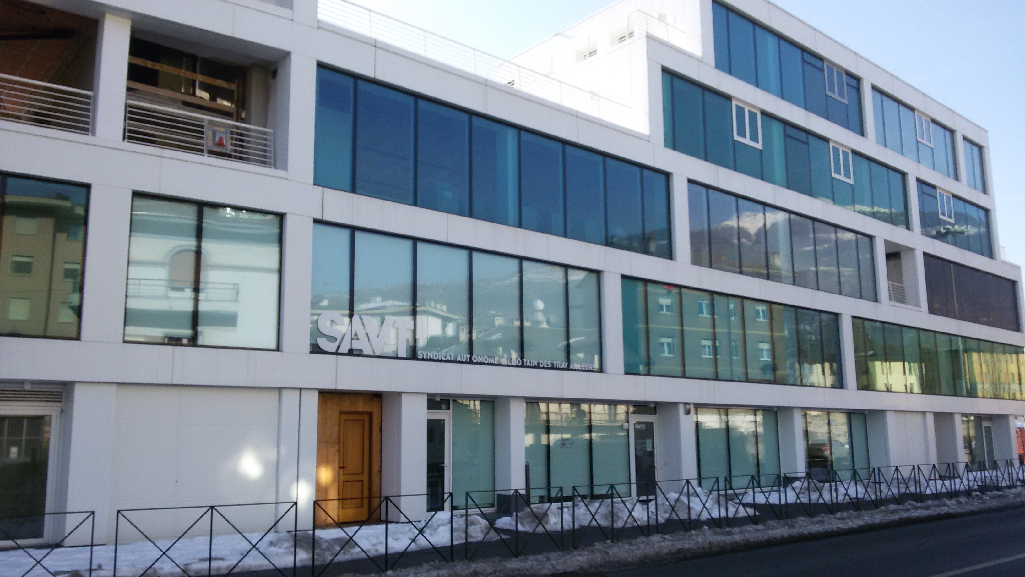 Siège du SAVT, av. Geroges Carrel à Aoste